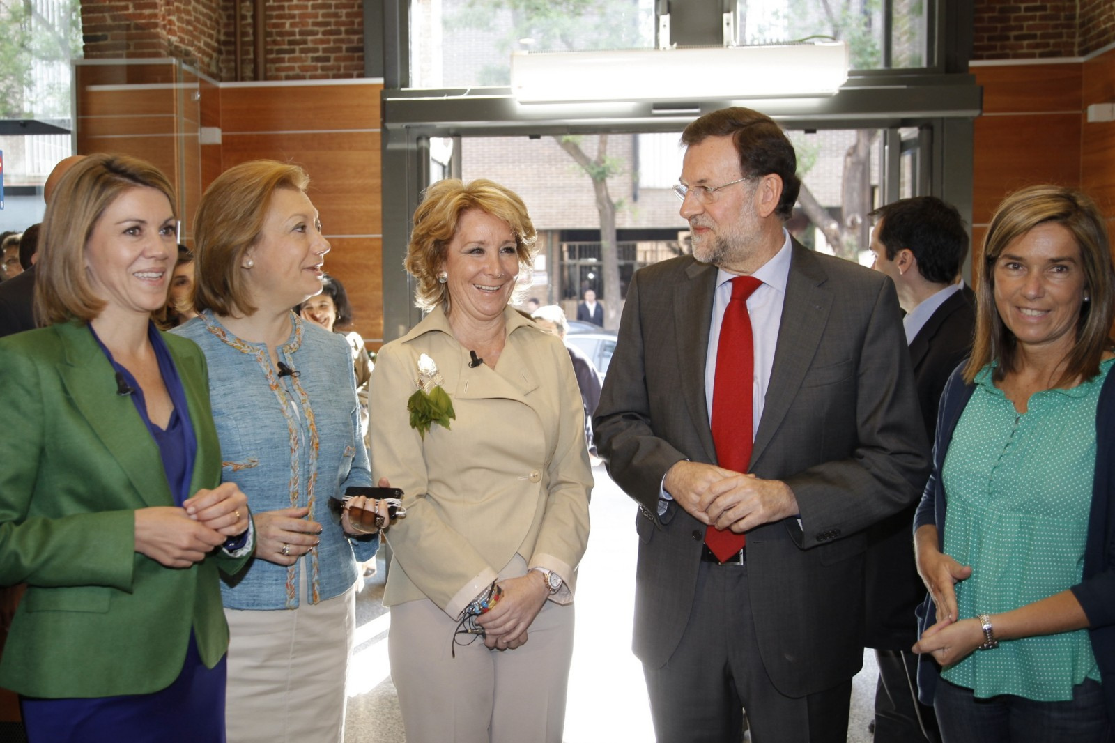 Mariano Rajoy, Esperanza Aguirre, Dolores de Cospedal, Luisa Fernanda Rudí y Ana Mato